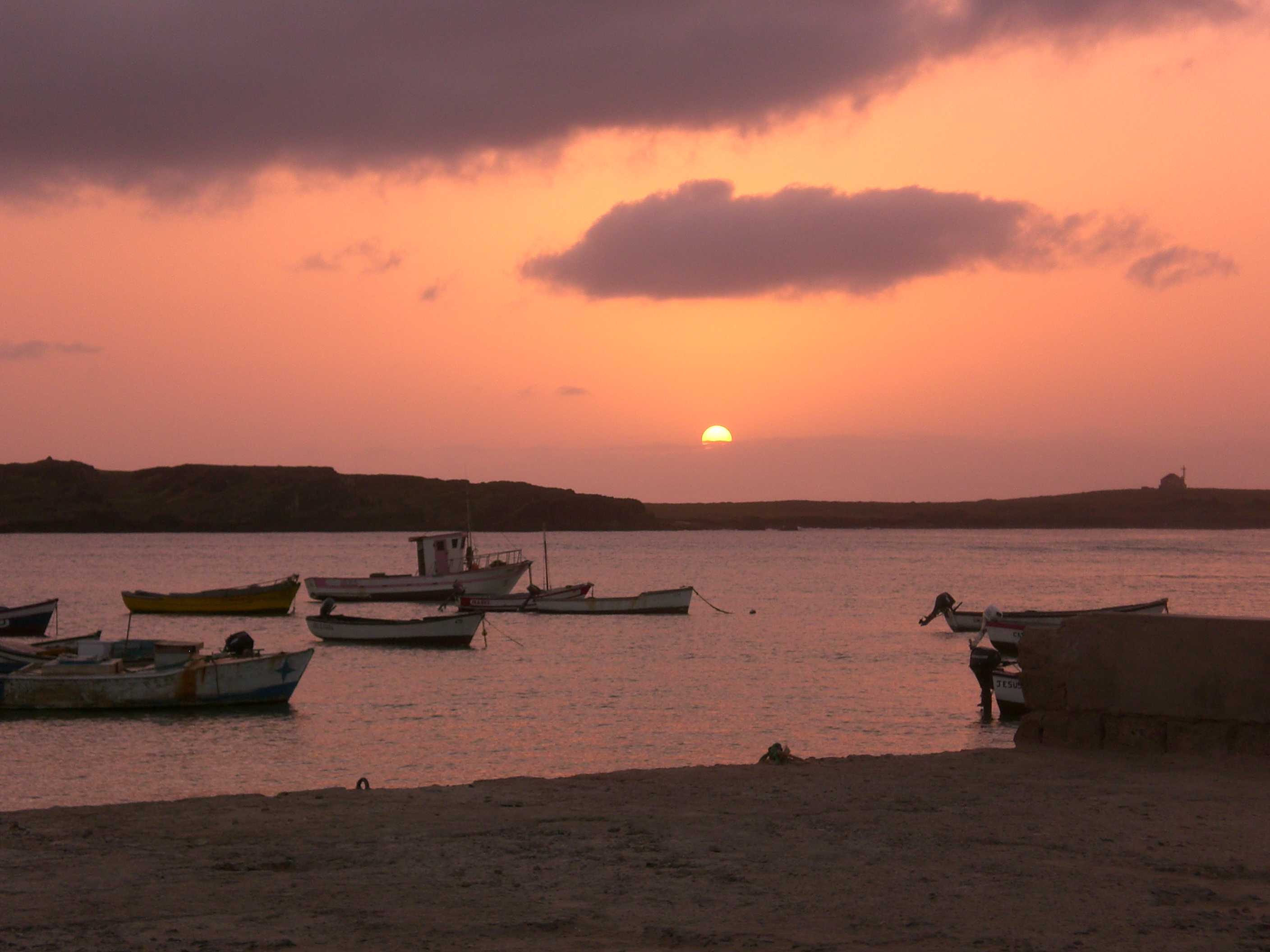 Puesta de sol sobre el Islote de Sal Rei